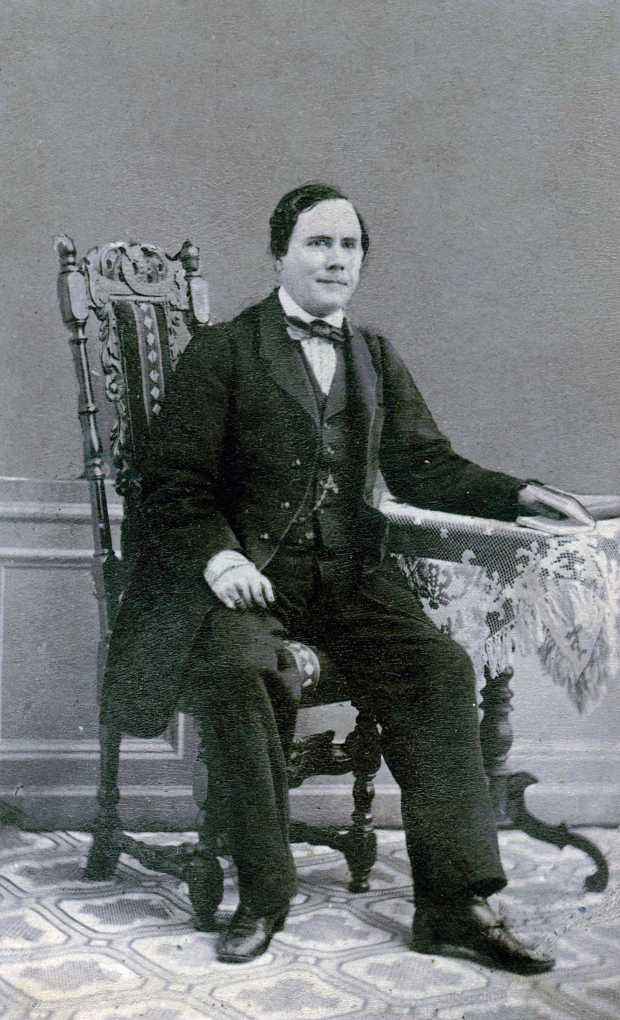 Anders Selinder, balettmästare och teaterdirektör 1862